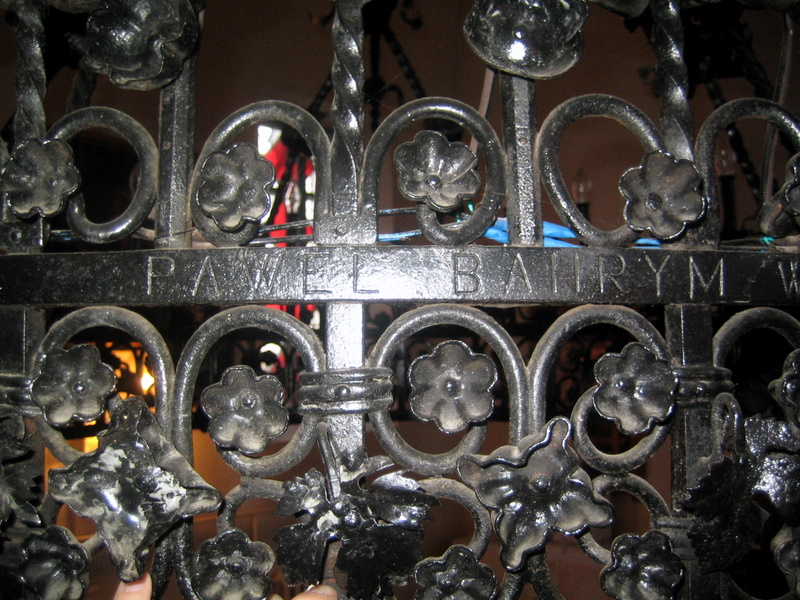 Фрагмент люстры з інскрыпцыяй П. Багрыма: Piotr Swietopelk-Zawadzki vlozyl na wzor Bastonskiego i evndowal Pawel Bahrym wykonal w Kroszynie nad Szczara r.p. 1881